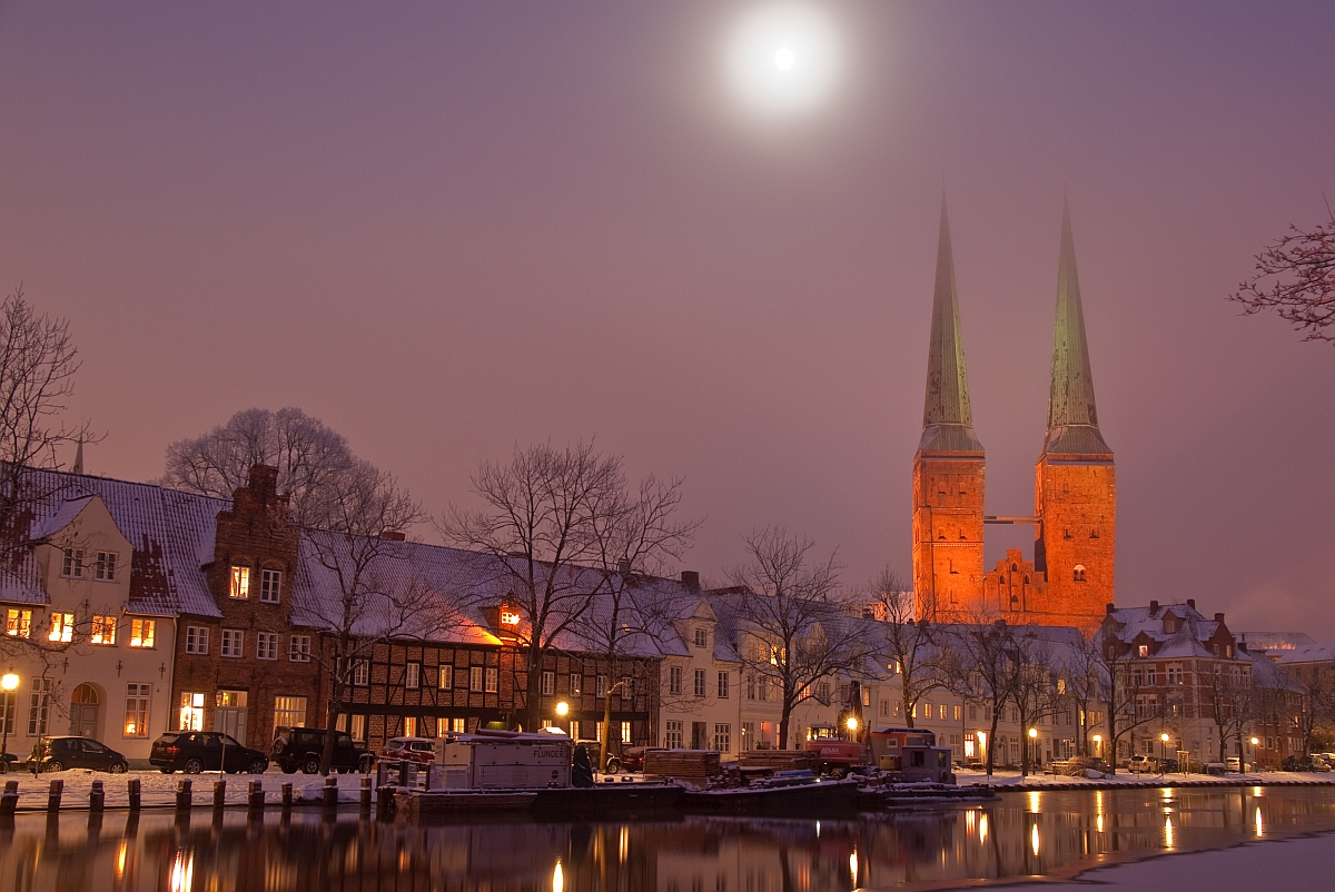 Blick über die Trave zum Lübecker Dom